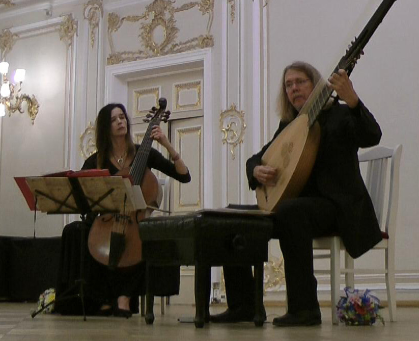 Хилле Перл и Ли Сантана на концерте в Малом зале Санкт-Петербургской филармонии. 25.10.2014.